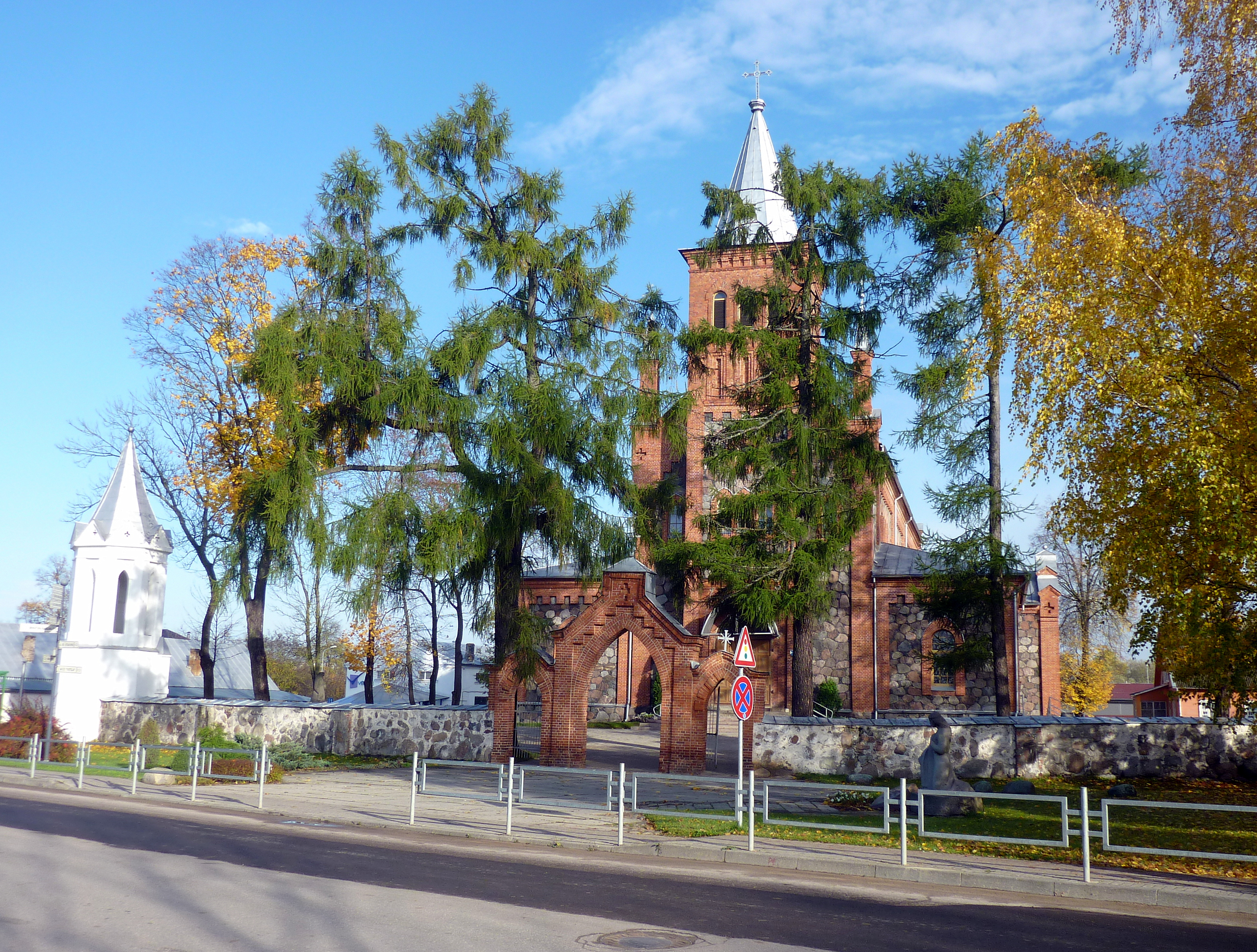 Prele - kościół rzymskokatolicki p.w. NMP